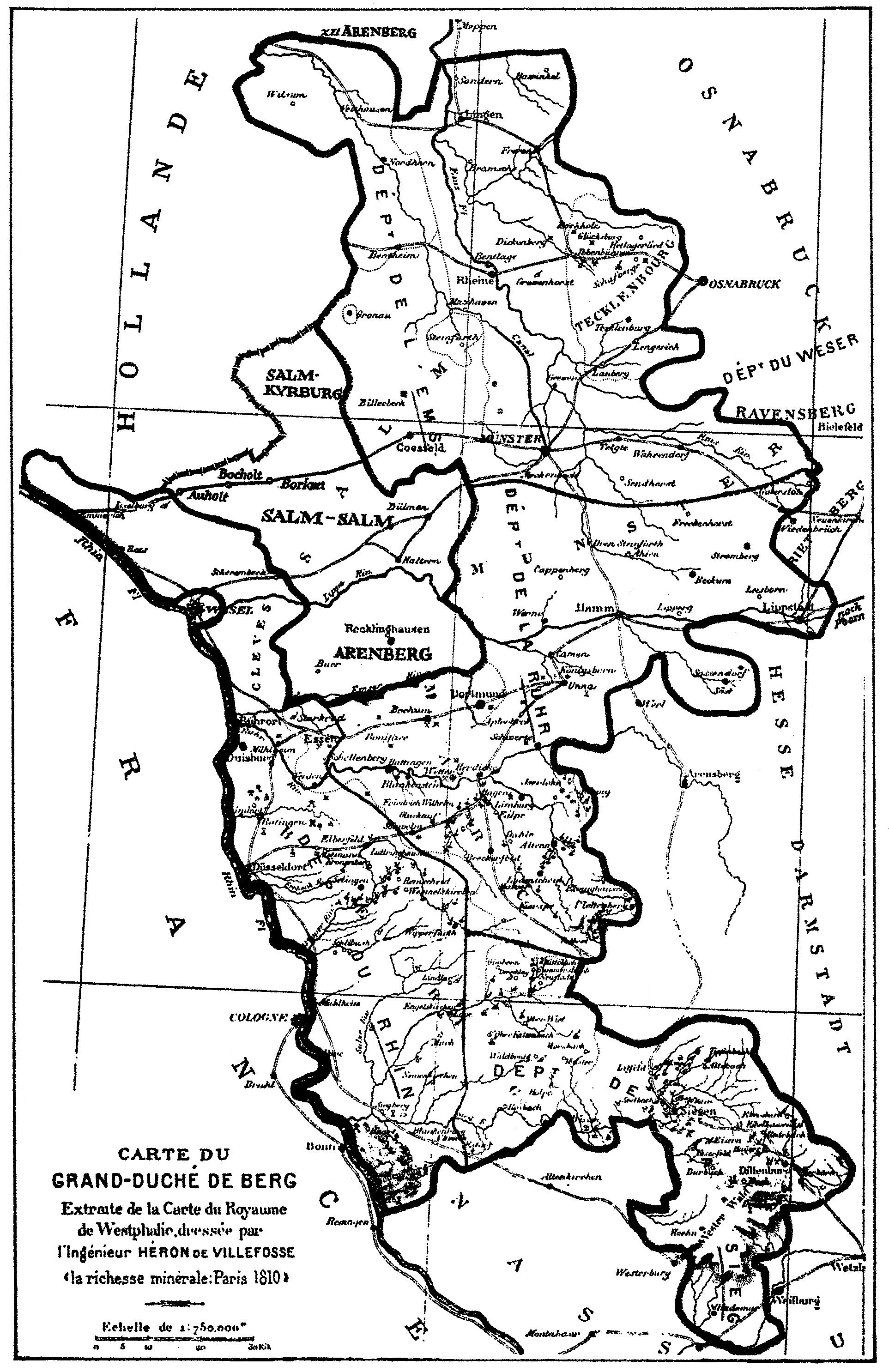 Karte des Großherzogtum Berg um 1810 Kopiert aus: Charles Schmidt, Das Großherzogtum Berg 1806-1813, Neustadt/Aisch 1999 Karte von 1810 W.Steven